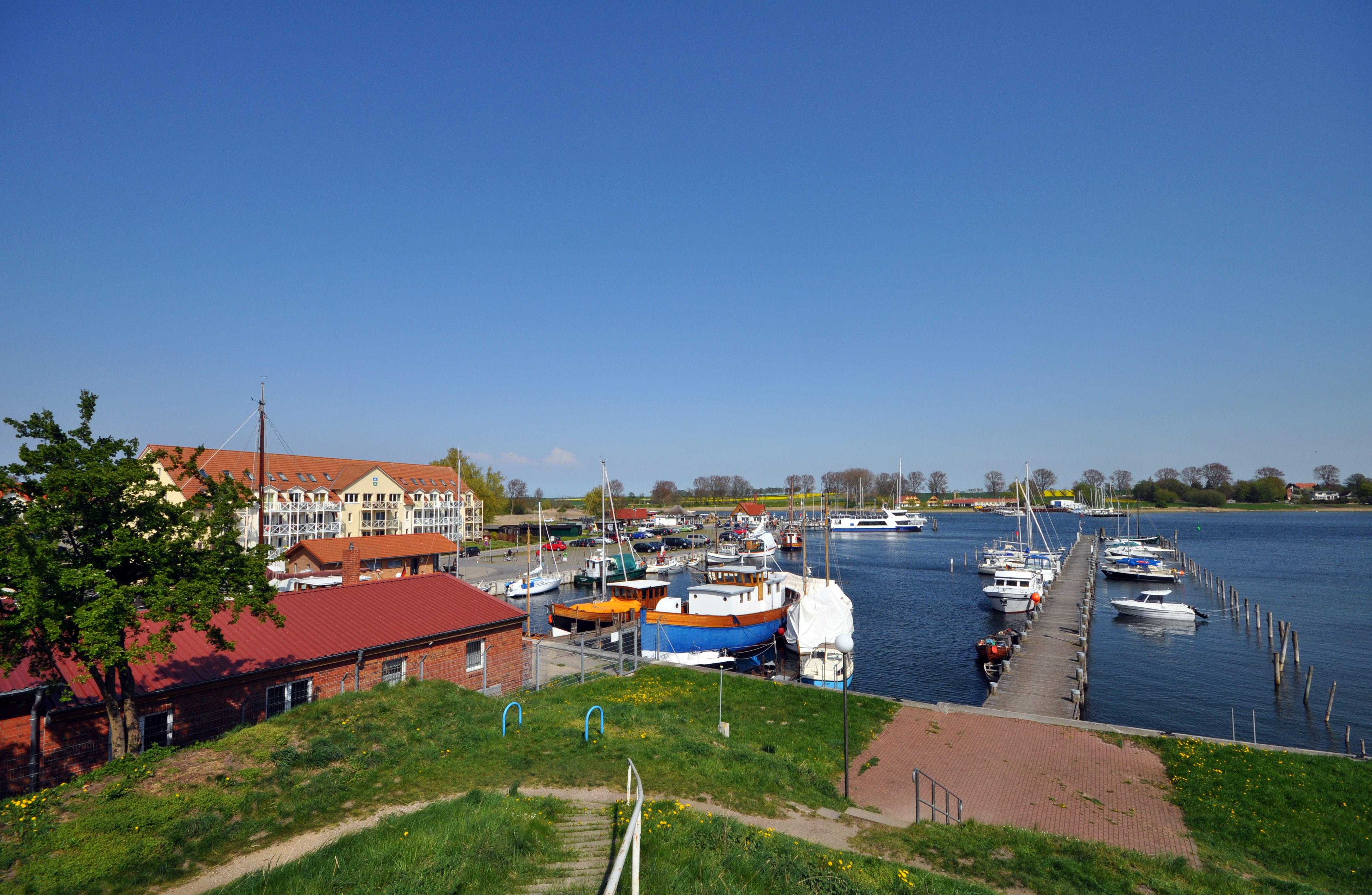 marina in Kirchdorf